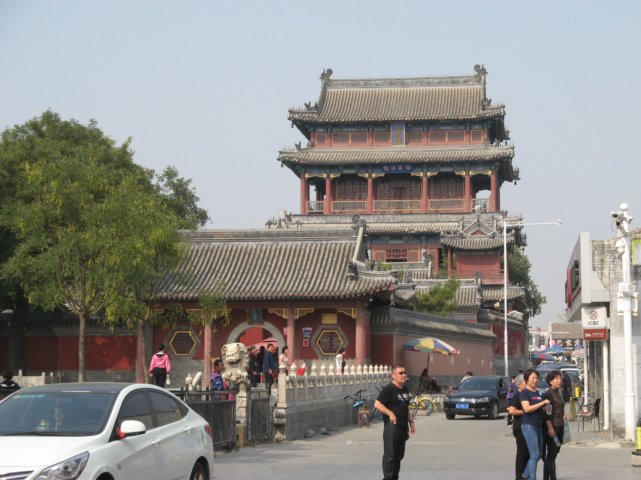 中国河北省保定市大慈阁，全国重点文物保护单位。